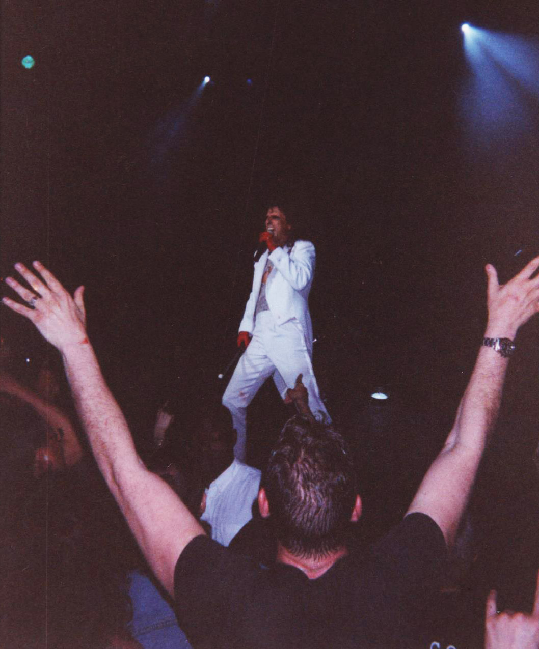 Alice Cooper, Paris Olympia 2001